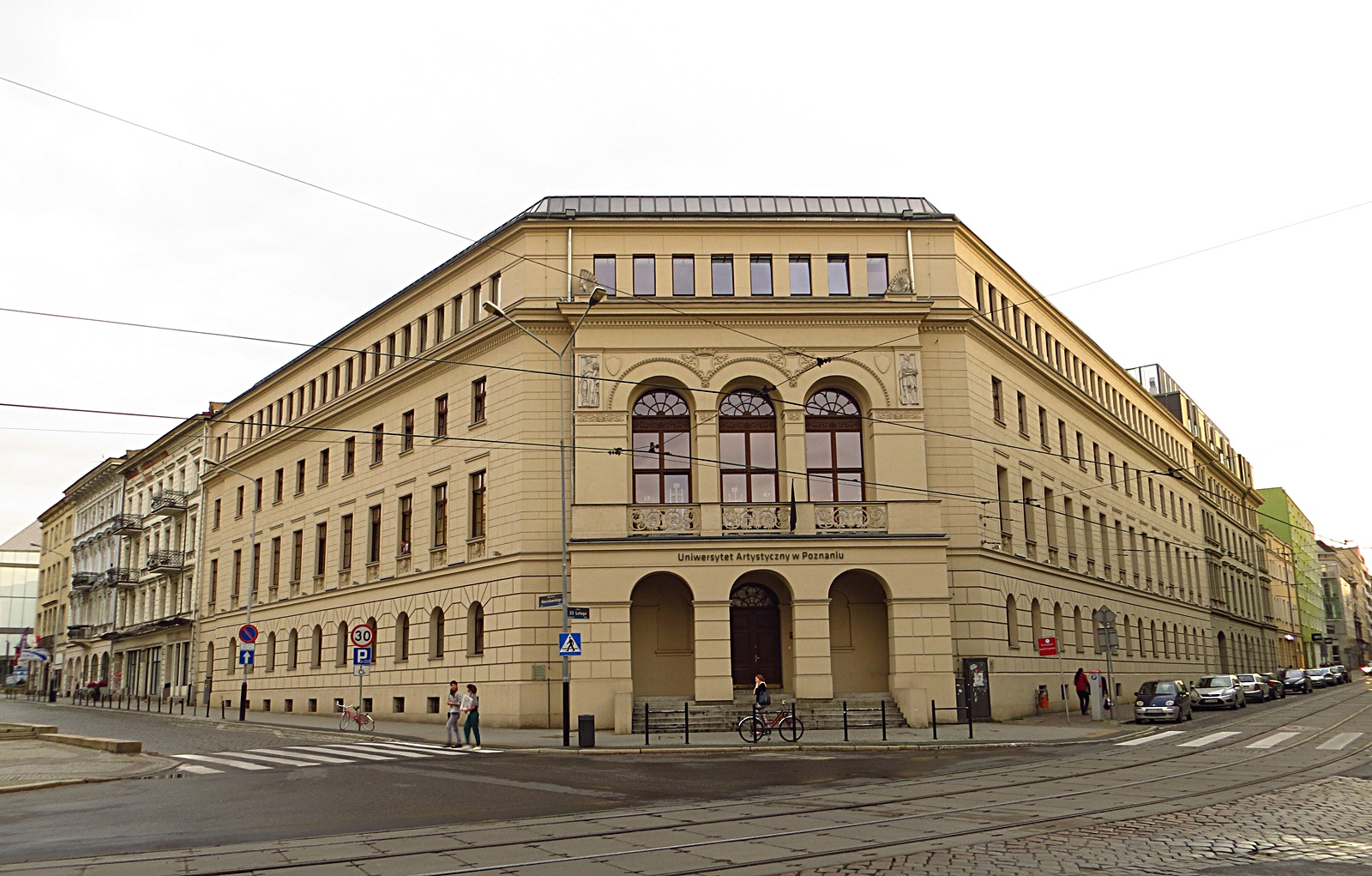 Uniwersytet Artystyczny w Poznaniu